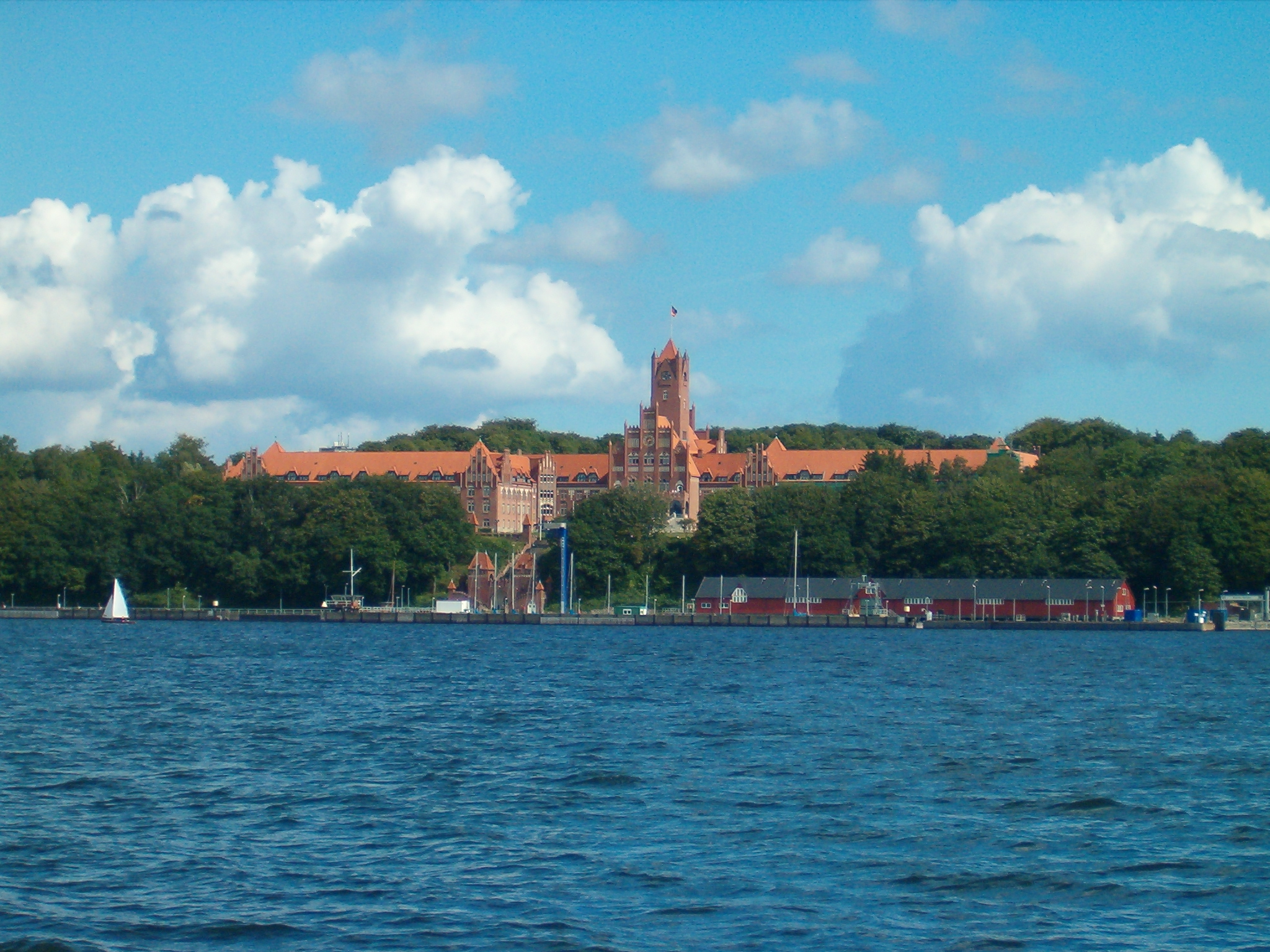 Marineschule Mürwik / Naval Academy Mürwik